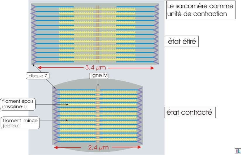 contraction du sarcomere